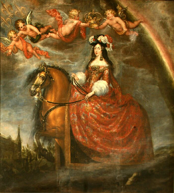 Retrato ecuestre de la reina María Luisa de Orleans (1662-1689), que fue reina consorte de España por su matrimonio con el rey Carlos II de España.